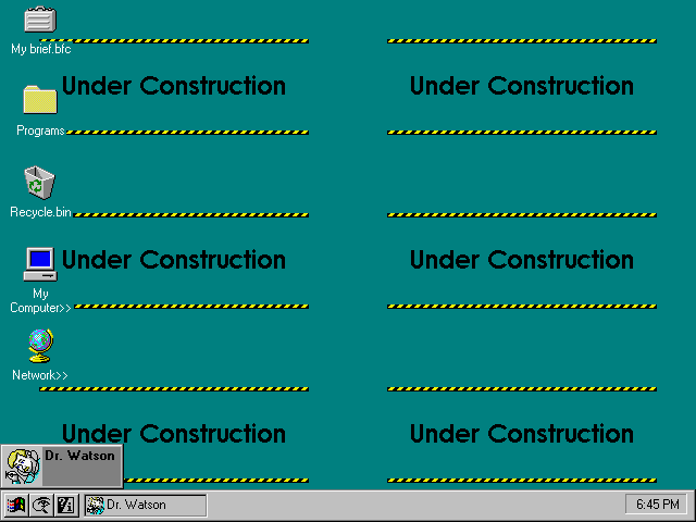 Schermata del desktop di Chicago build 73f in esecuzione su PCem.